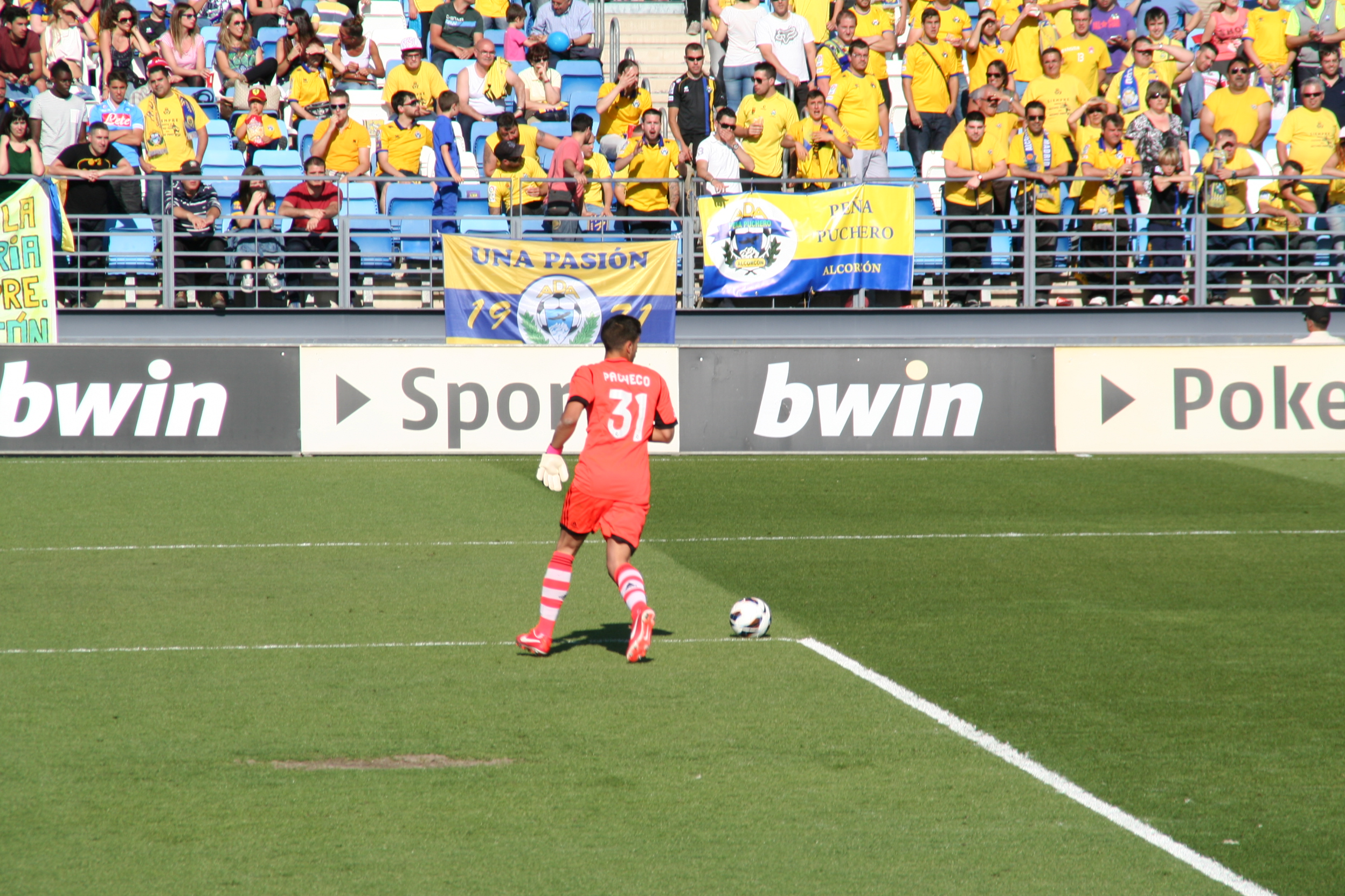 VS AD Alcorcón (Liga Adelante)